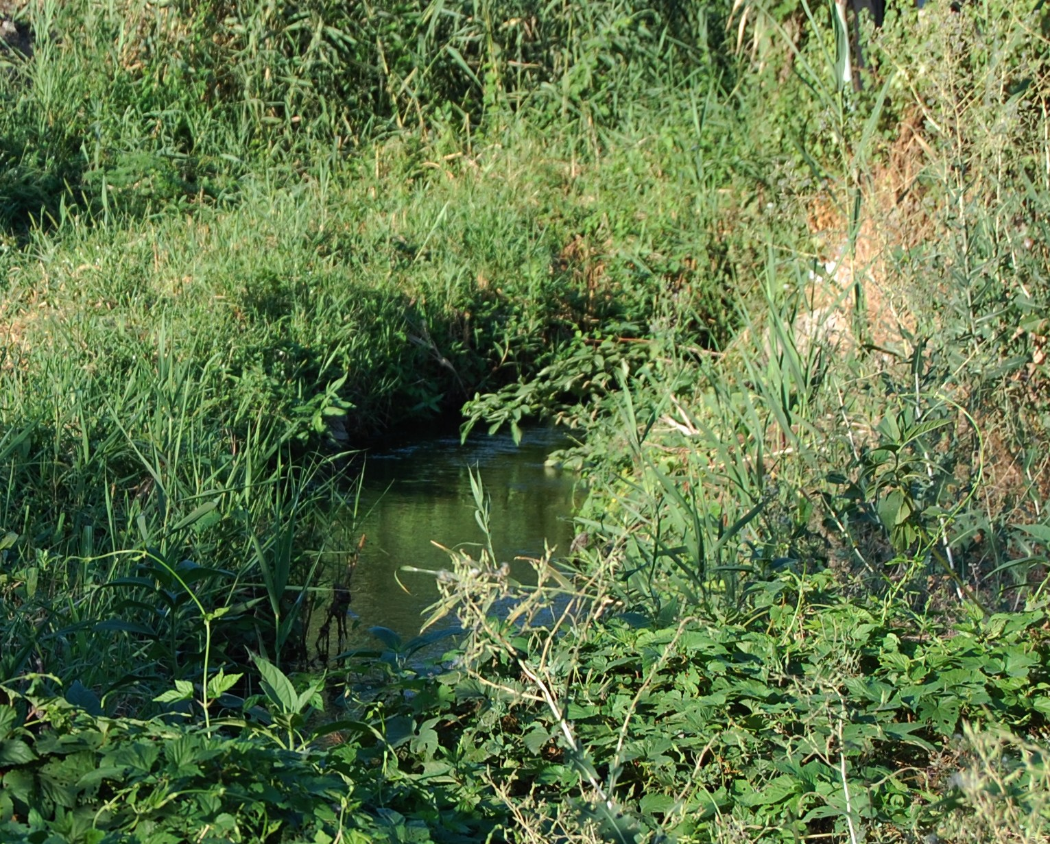 Таганрог. Русло малой реки Малая Черепаха (район Таганрогского кожевенного завода), 2014 год.